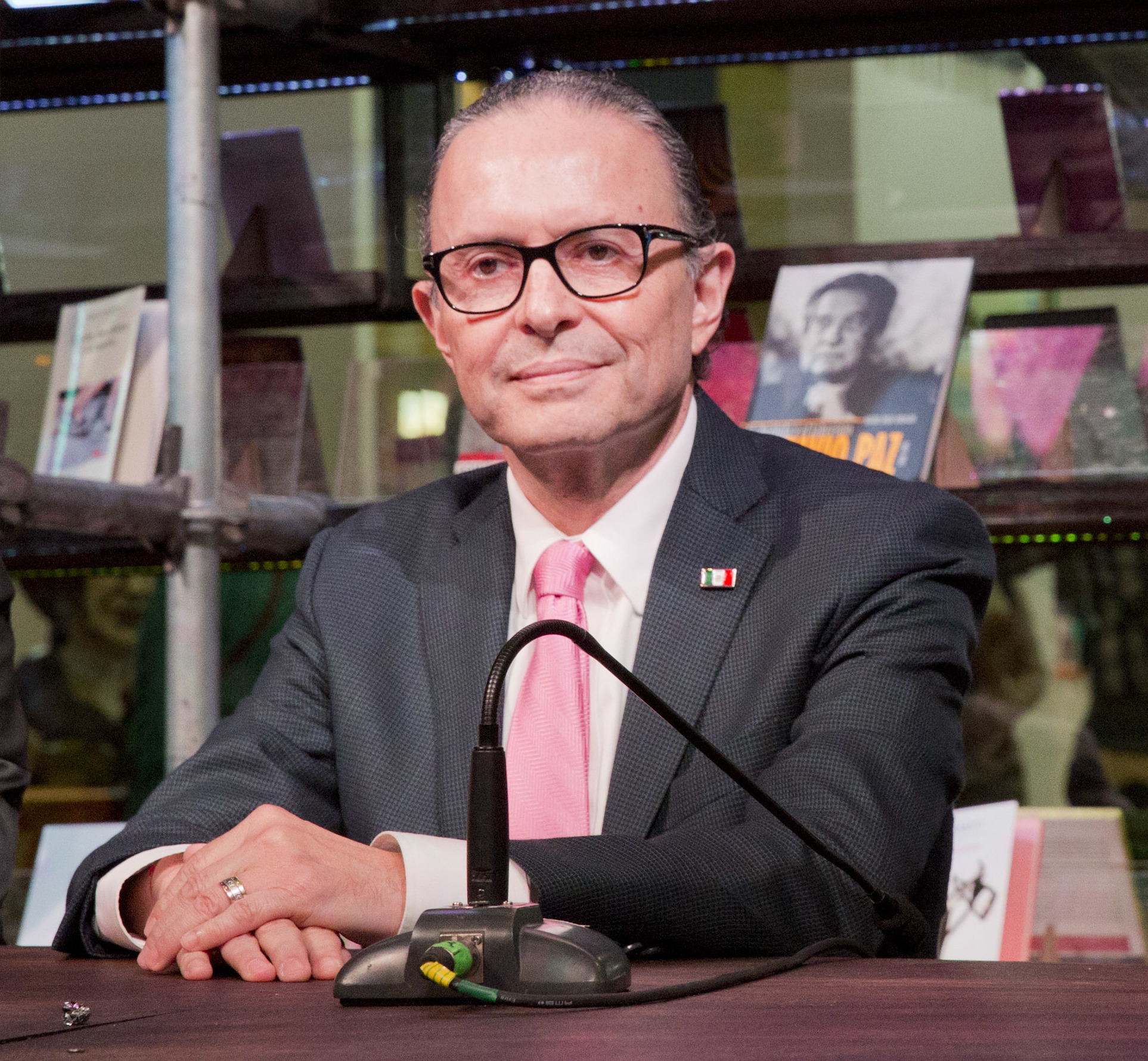 Buenos Aires, 1 de Mayo de 2015 - La ministra de Cultura de la Nación, Teresa Parodi, junto al director de la Biblioteca Nacional, Horacio González, recibieron la donación de todos los libros del stand de México, en la 41ª Feria Internacional del Libro en Buenos Aires, para la Biblioteca Nacional. También estuvieron presentes: el embajador de México en Argentina, Fernando Castro Trenti; el secretario de Cultura del Gobierno de la Ciudad de Mèxico, Eduardo Vázquez Martín; el presidente de la Fundación El Libro; Martín Gremmelspacher; y el secretario de Gestión Cultural del Ministerio de Cultura de la Nación, Jorge Espiñeira.- Foto: Margarita Solé / Ministerio de Cultura de la Nación